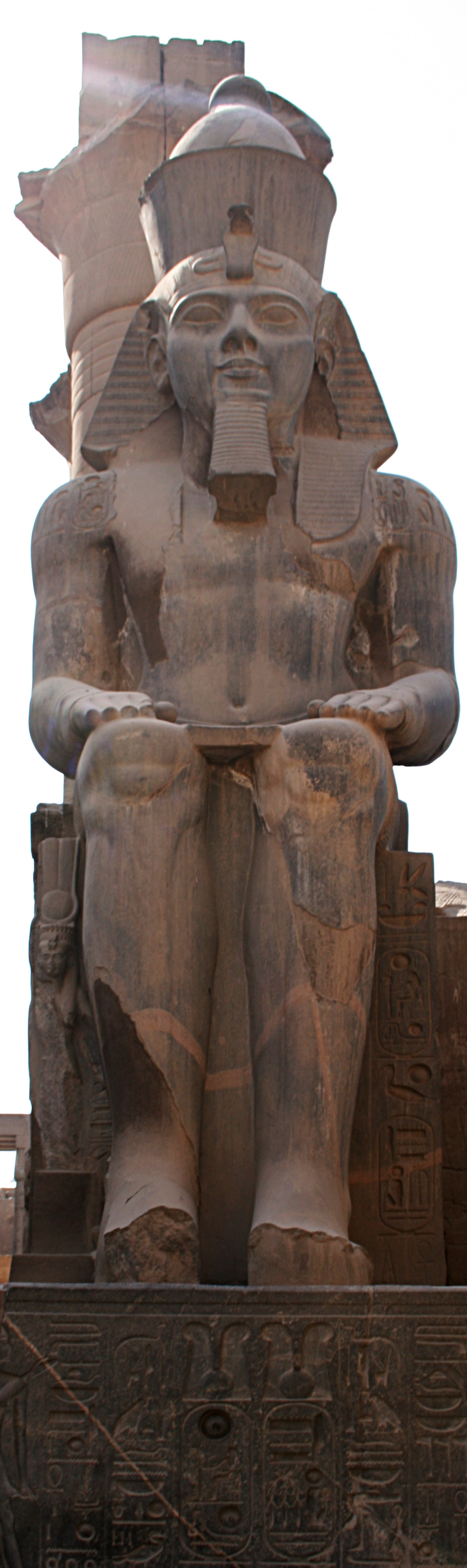 Luxor Tempel